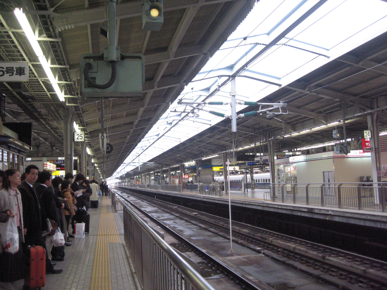 Shin-Osaka Station, Osaka, Kansai Region.